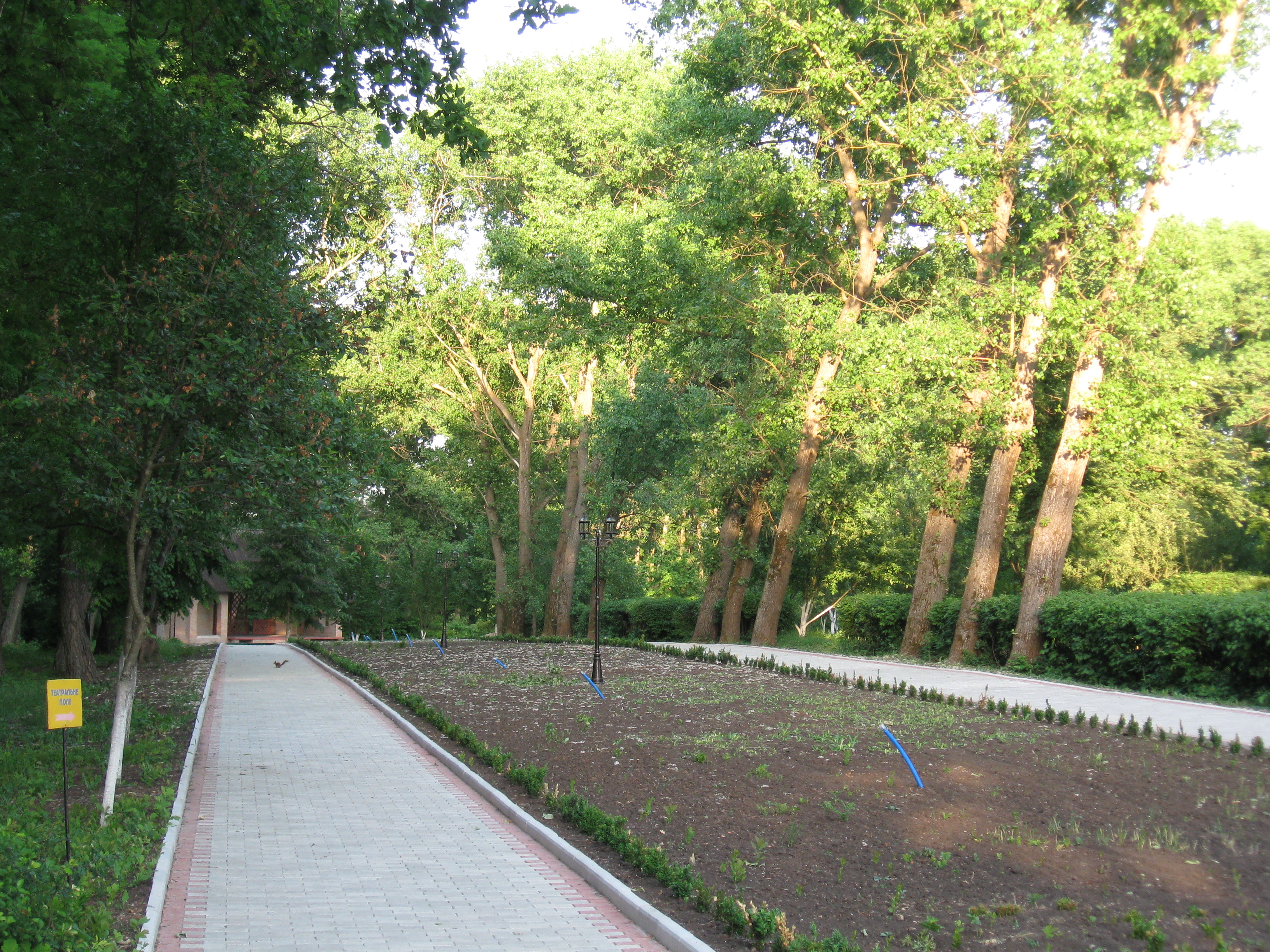 «Хутір Надія», Кіровоградський р-н, с. Миколаївка